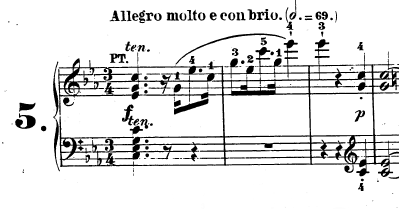 Compassos iniciais do primeiro movimento da Sonata Op. 10 nº 1 de Beethoven